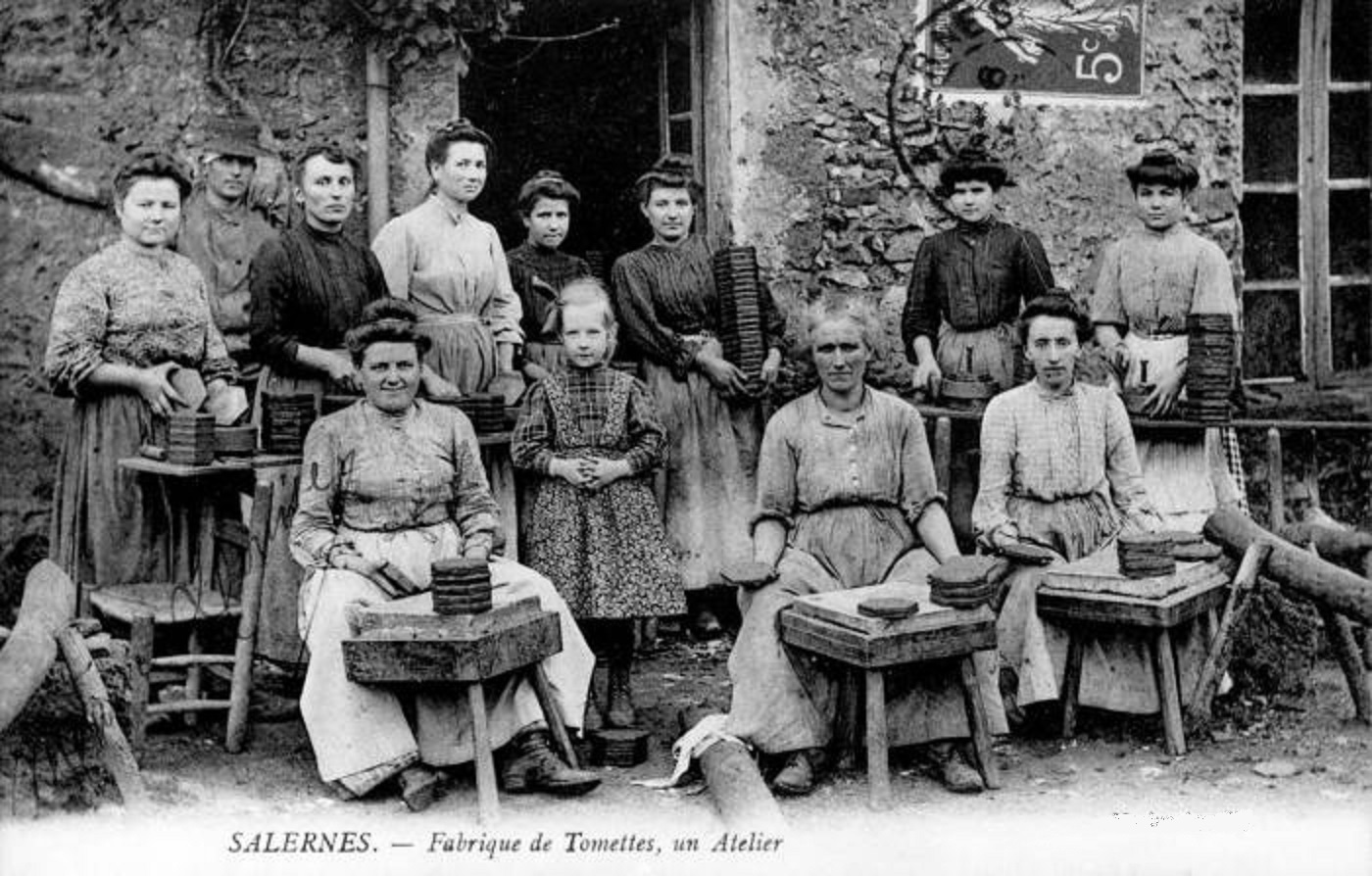 Fabrique de tomettes provençales à Salernes